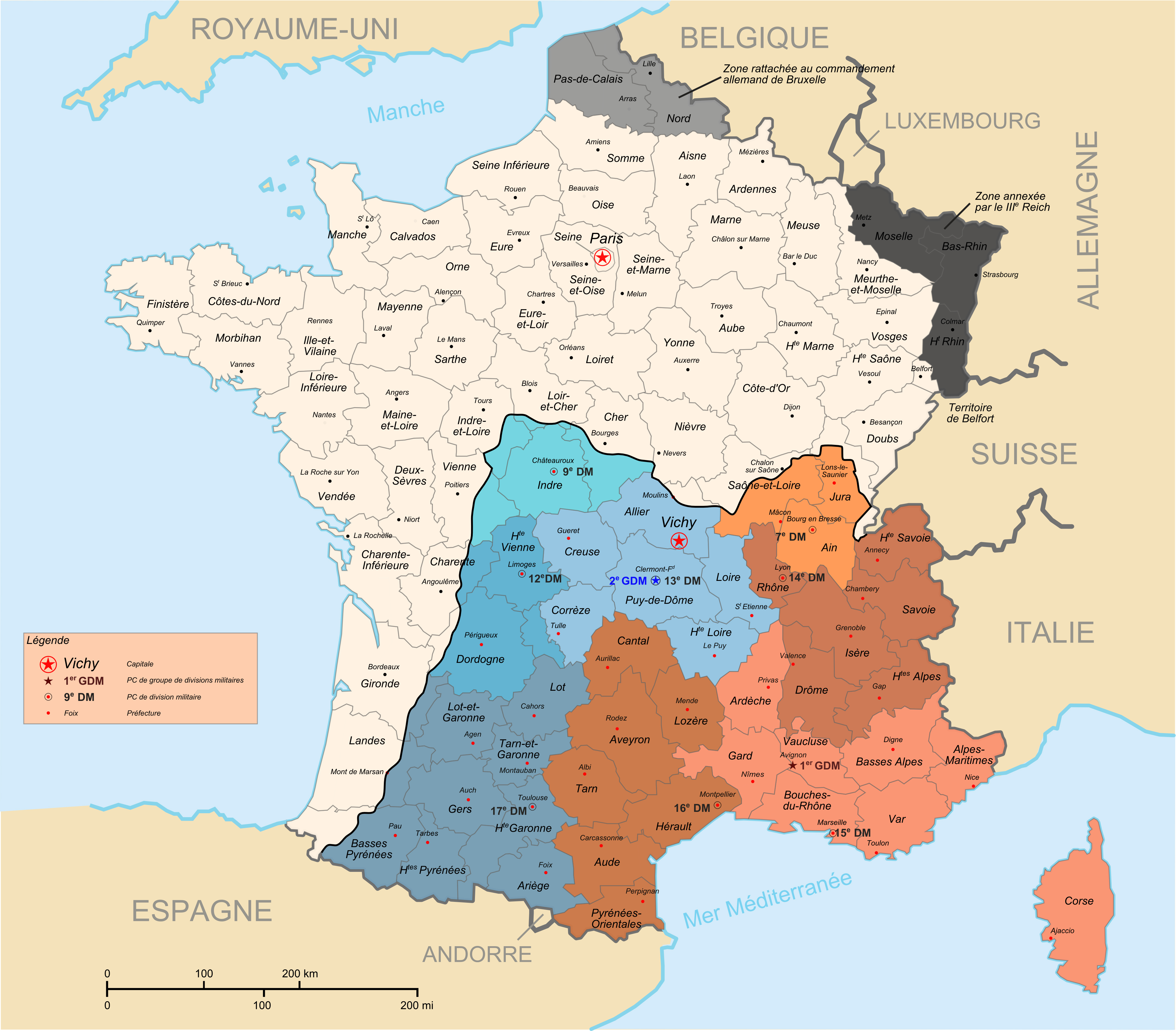 carte donnant l'implantation des divisions militaires françaises (armée d'armistice) durant la période 1940-1942